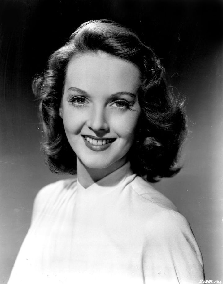 Lucille Bremer